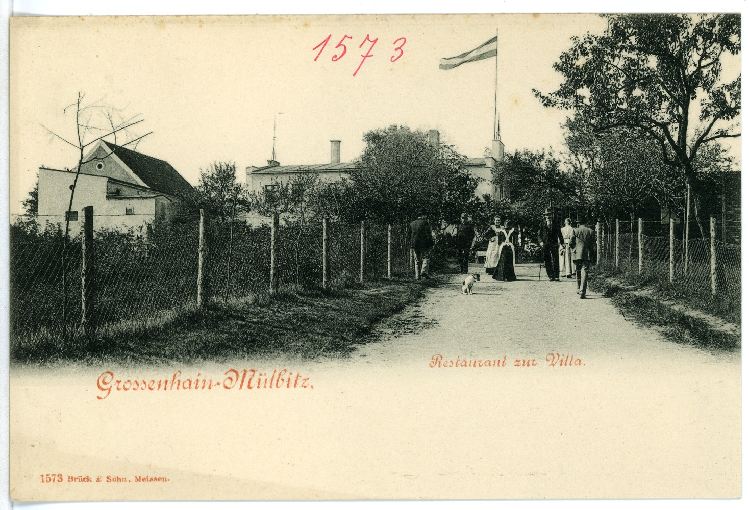 Großenhain; Restaurant zur Villa, Mülbitz This postcard is from publisher Brück & Sohn in Meißen ( postcard has a unique number 01573 and is available in a higher resolution at the publisher. This images was uploaded in a cooperation project between Wikipedians and the publisher.